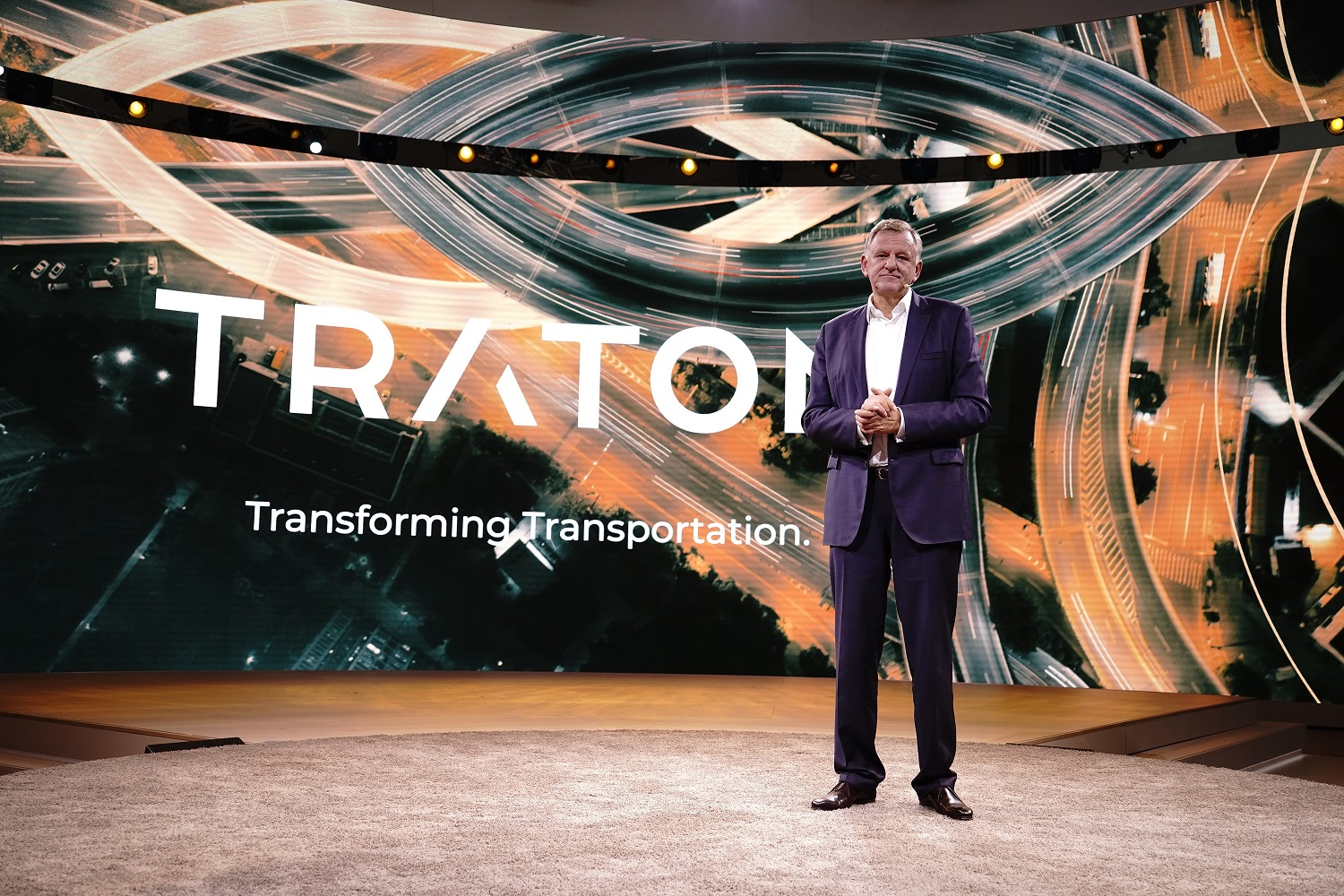 CEO Andreas Renschler auf der IAA 2018, 18. September 2019